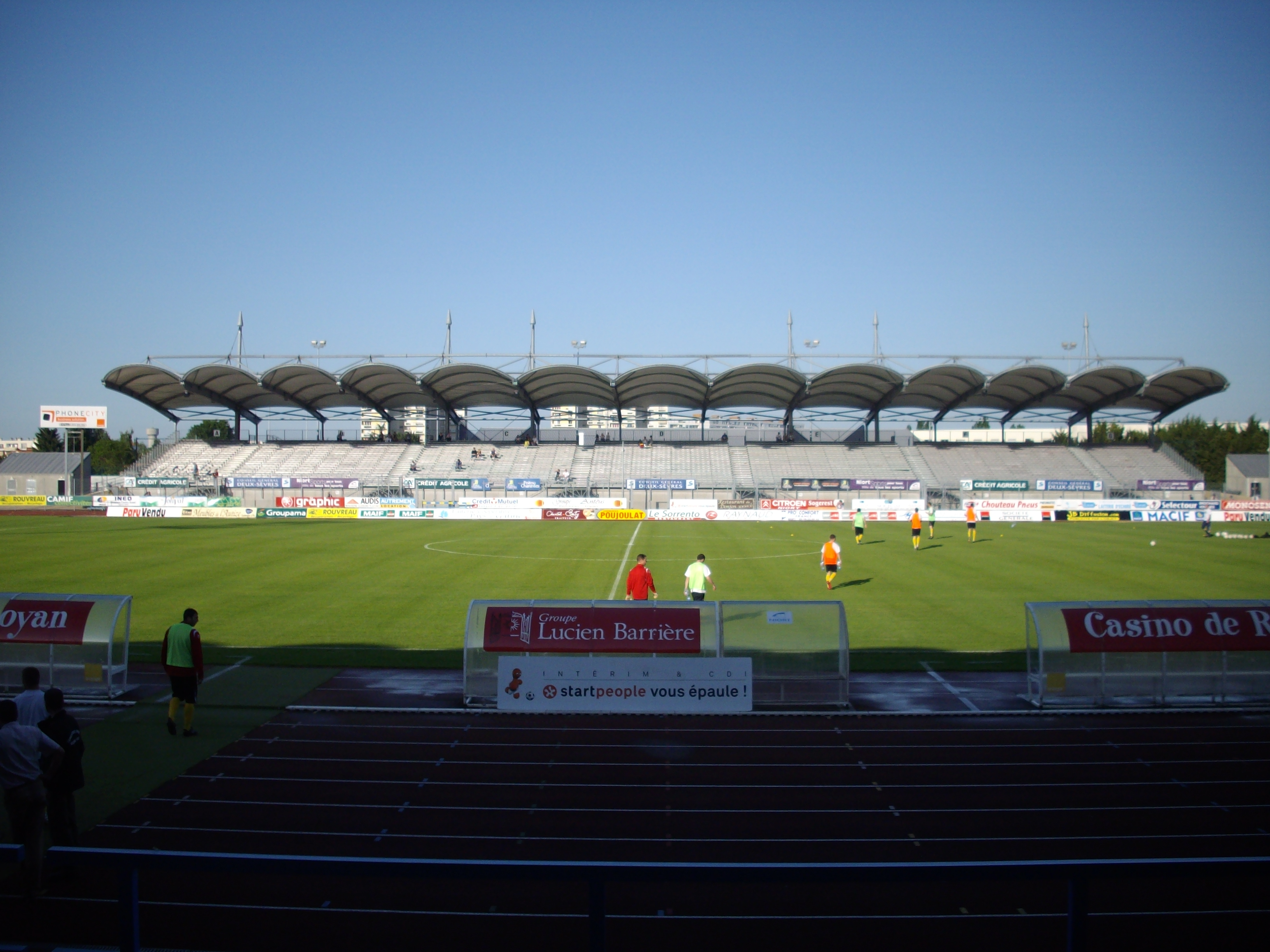 Tribune Pesage du Stade René Gaillard de Niort.